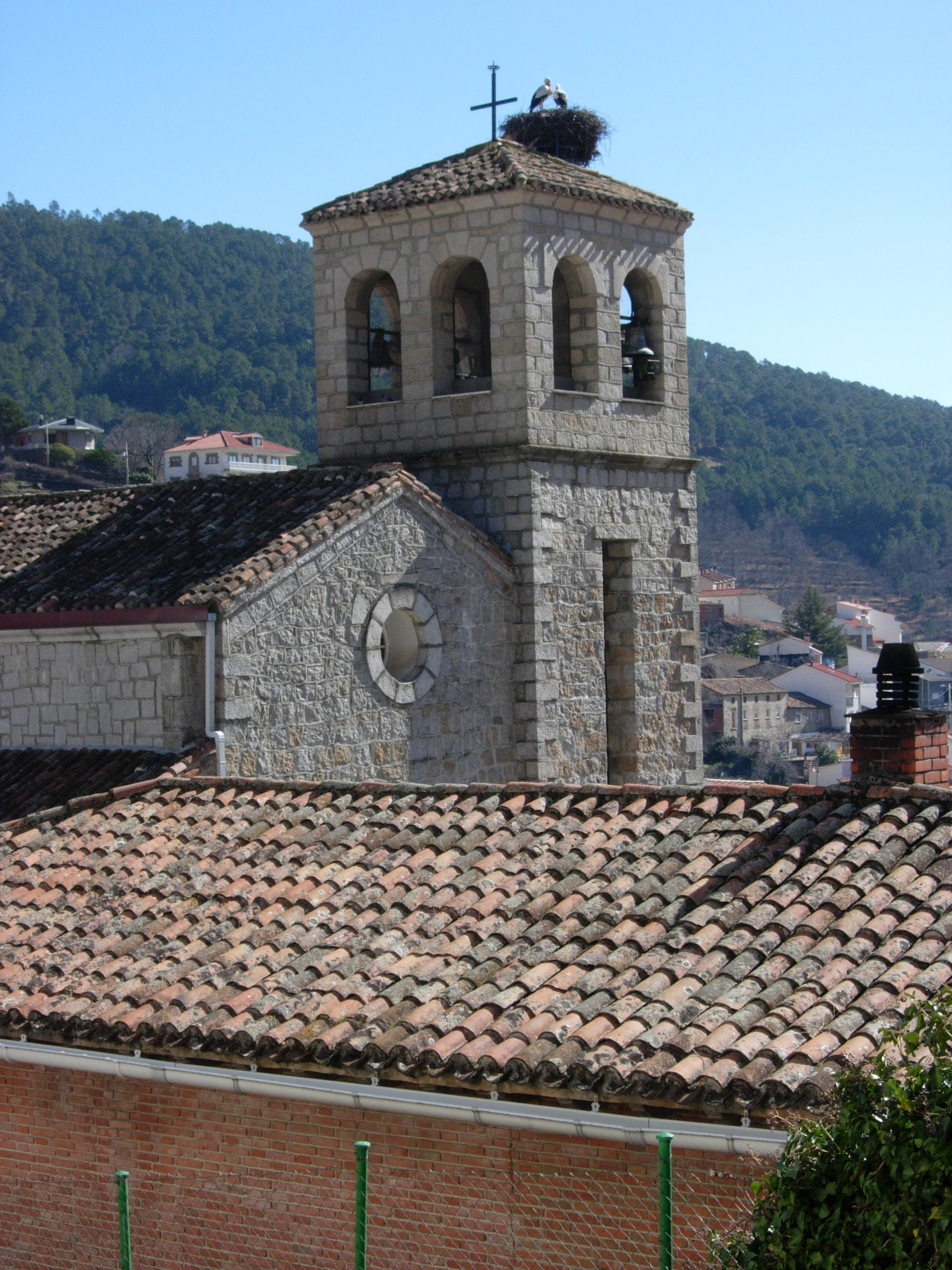 Torre de Iglesia en Mijares